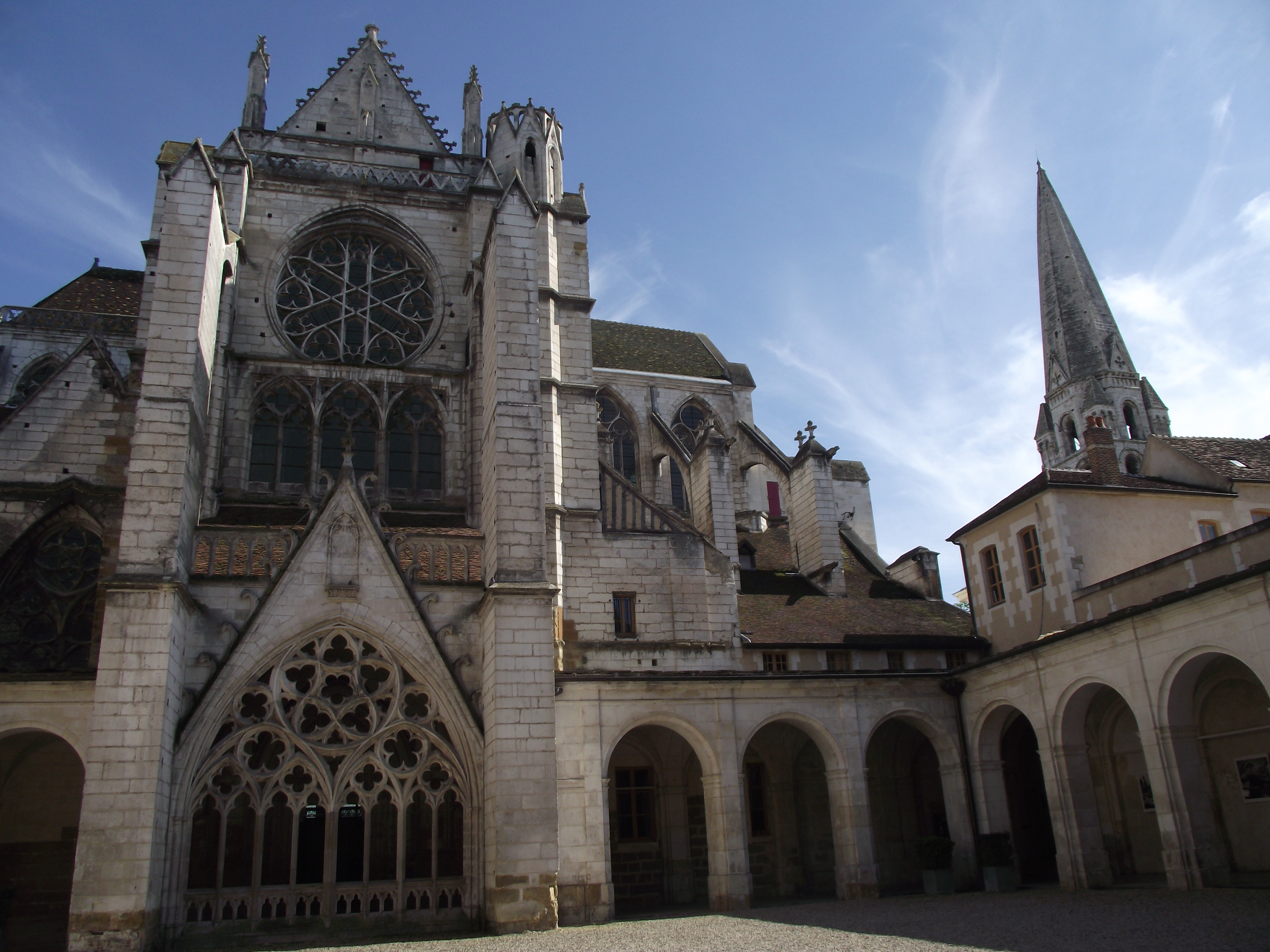 Auxerre, Abbaye Saint-Germain, XIII-XV siècles